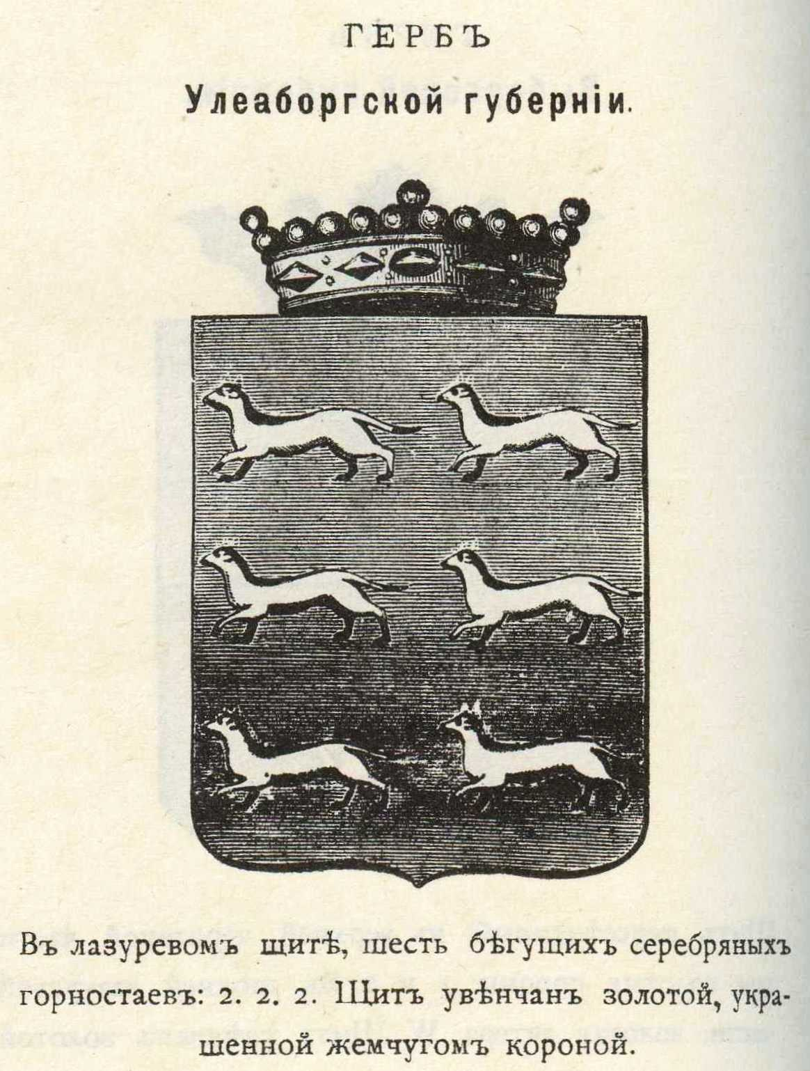 Official Russian Empire Uleaborg Governorate coat of arms. Герб Улеаборгской губернии Российской Империи Великого Княжества Финляндского с официальным описанием в Гербовнике Винклера.